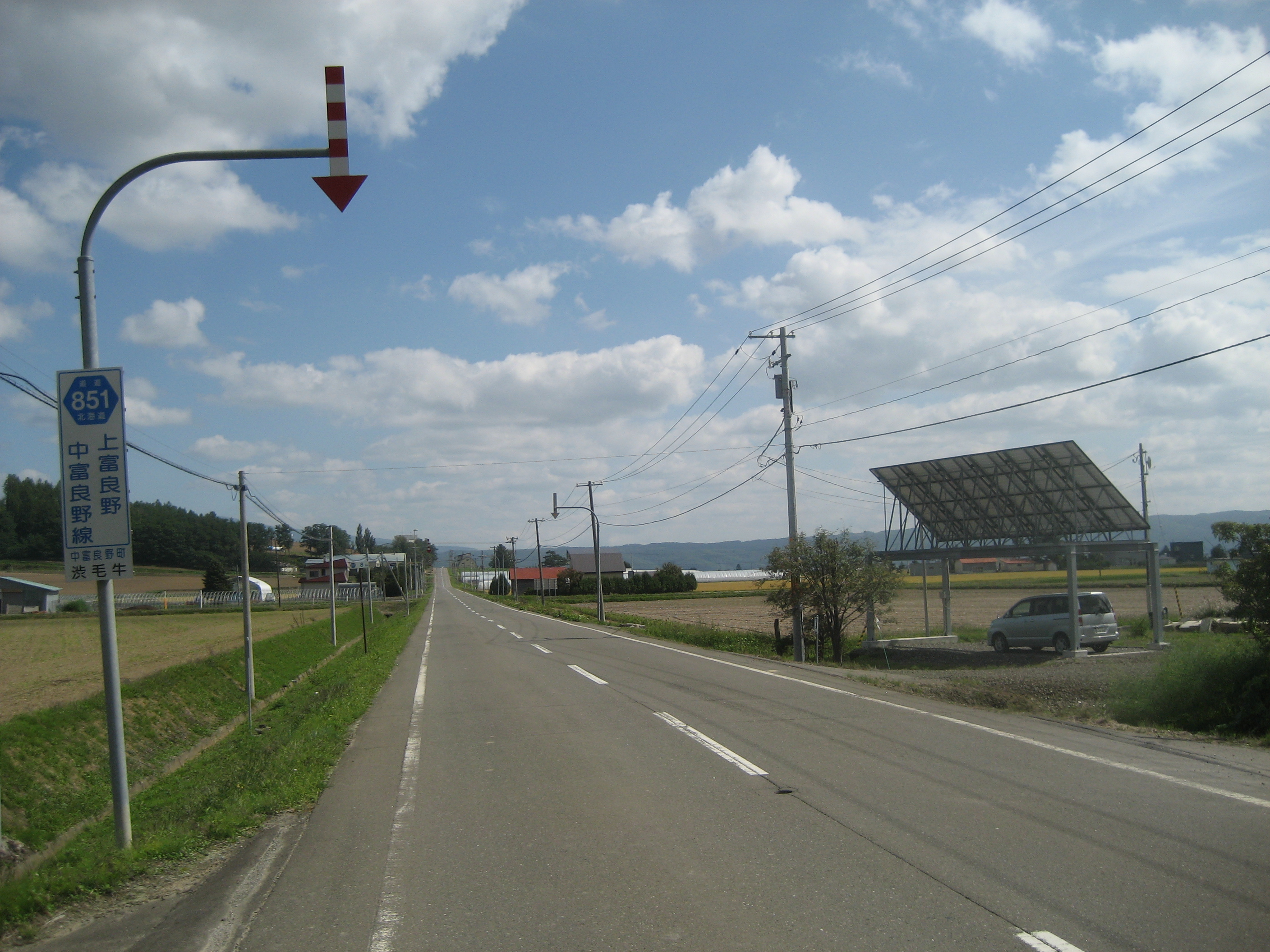 北海道道851号線中富良野町渋毛牛（中富良野町市街地方面を撮影）